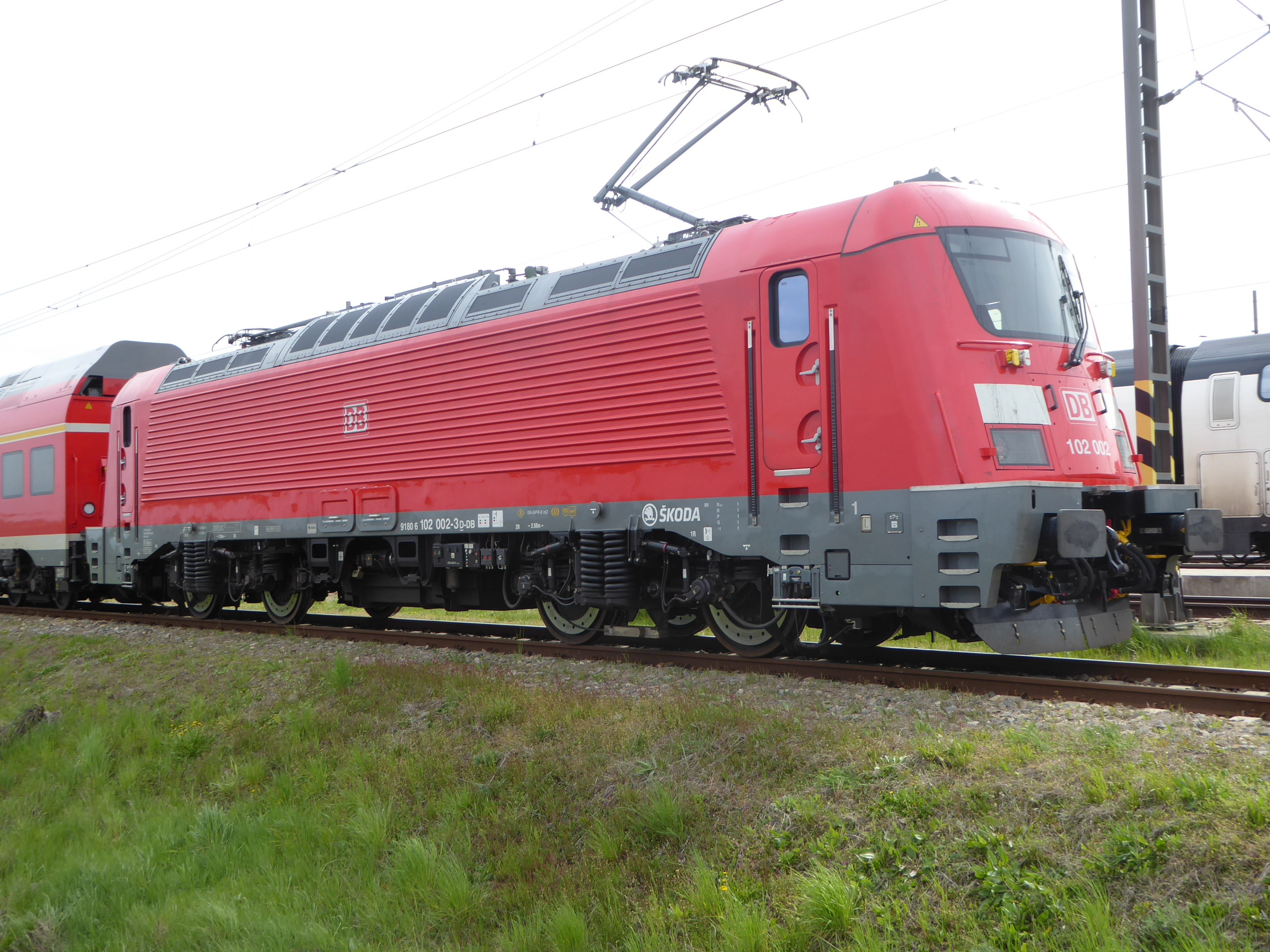 DB-Baureihe 102 002 vor einem Doppelstockwendezug des München-Nürnberg-Express auf dem Eisenbahnversuchsring Velim (CZ)